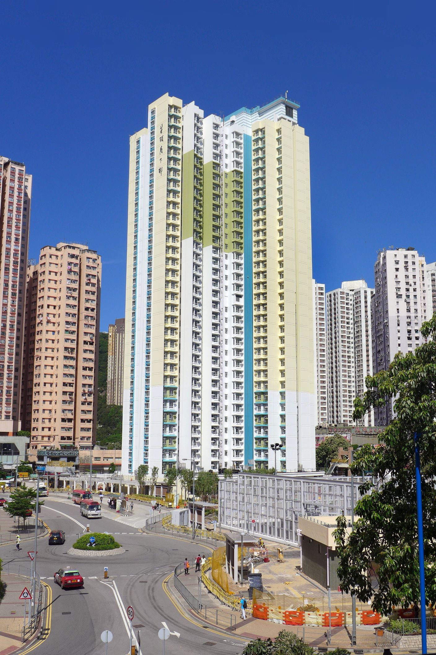 Lower Ngau Tau Kok Estate Phase 2